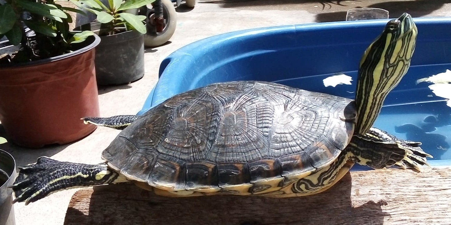 se muestra a una tortuga de la especie trachemys venusta